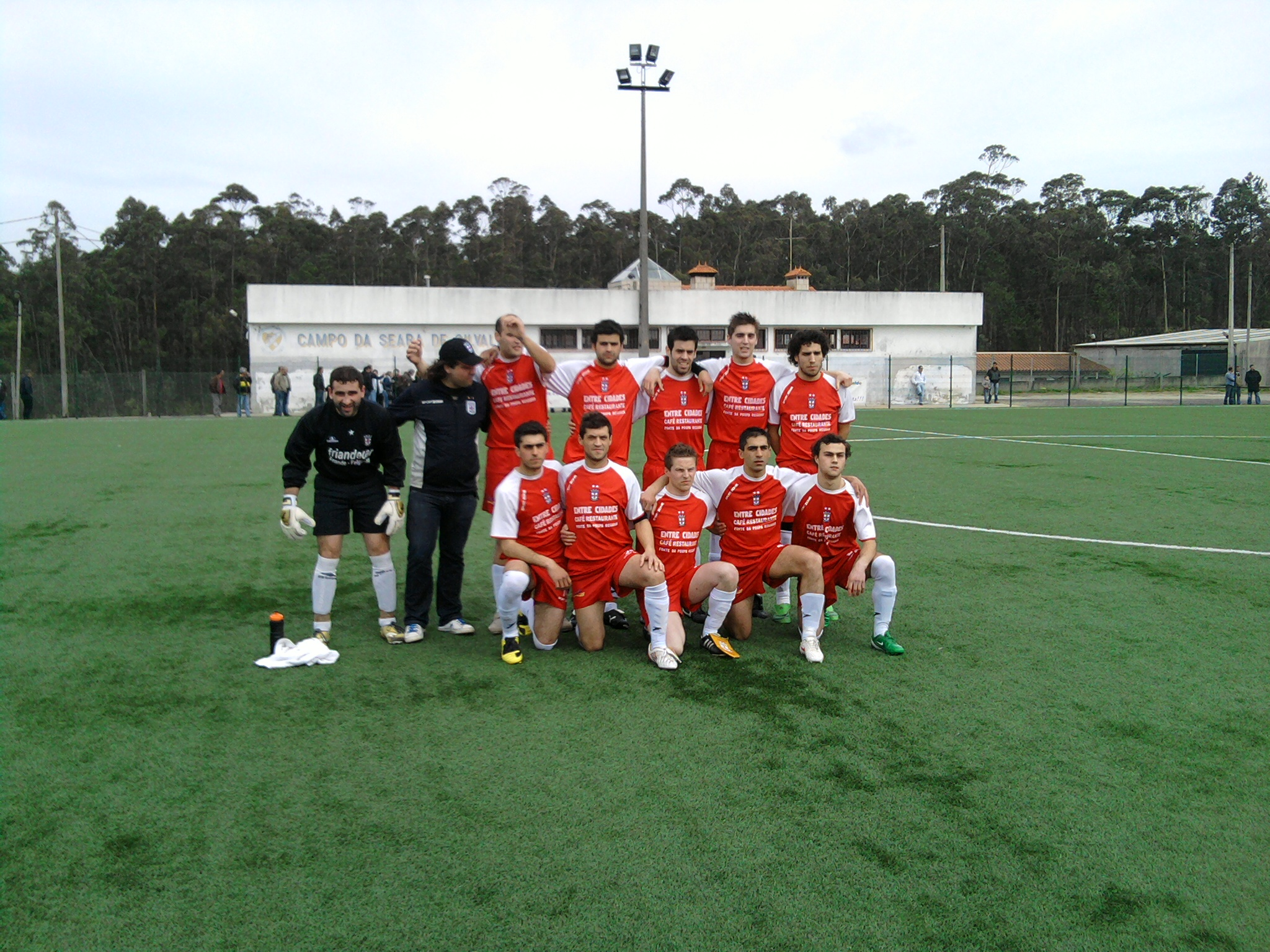 A equipa do GCD Regadas no jogo conta a Juventude de Outeiros, a contar para a Taça dos Campeões da Federação de Futebol Popular do Norte